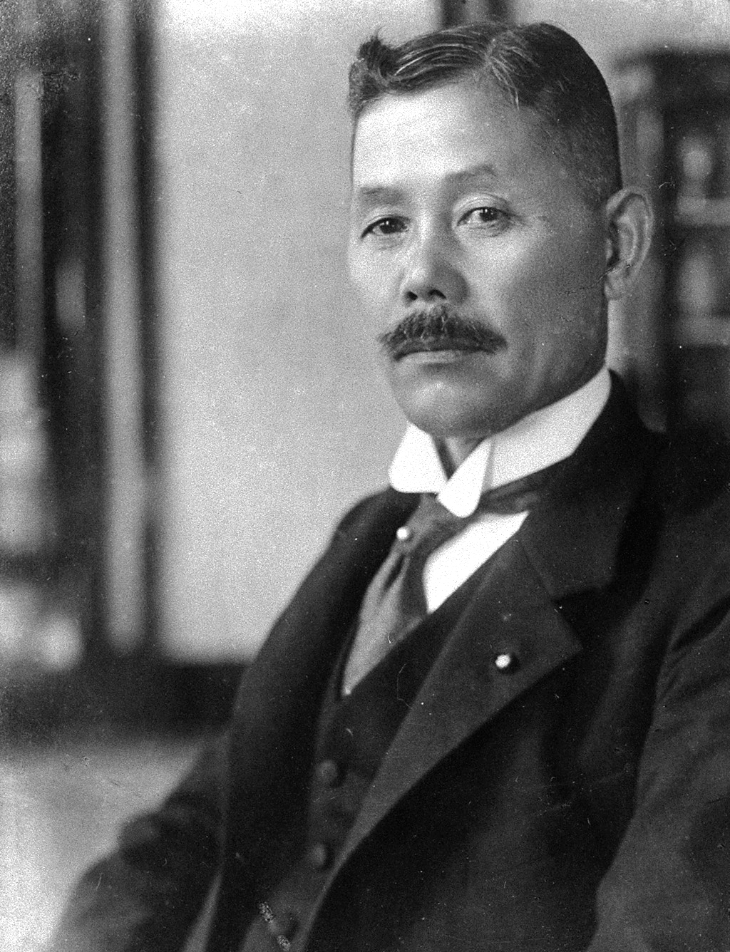 Portrait of Wakatsuki Reijiro (若槻礼次郎, 1866 – 1949)